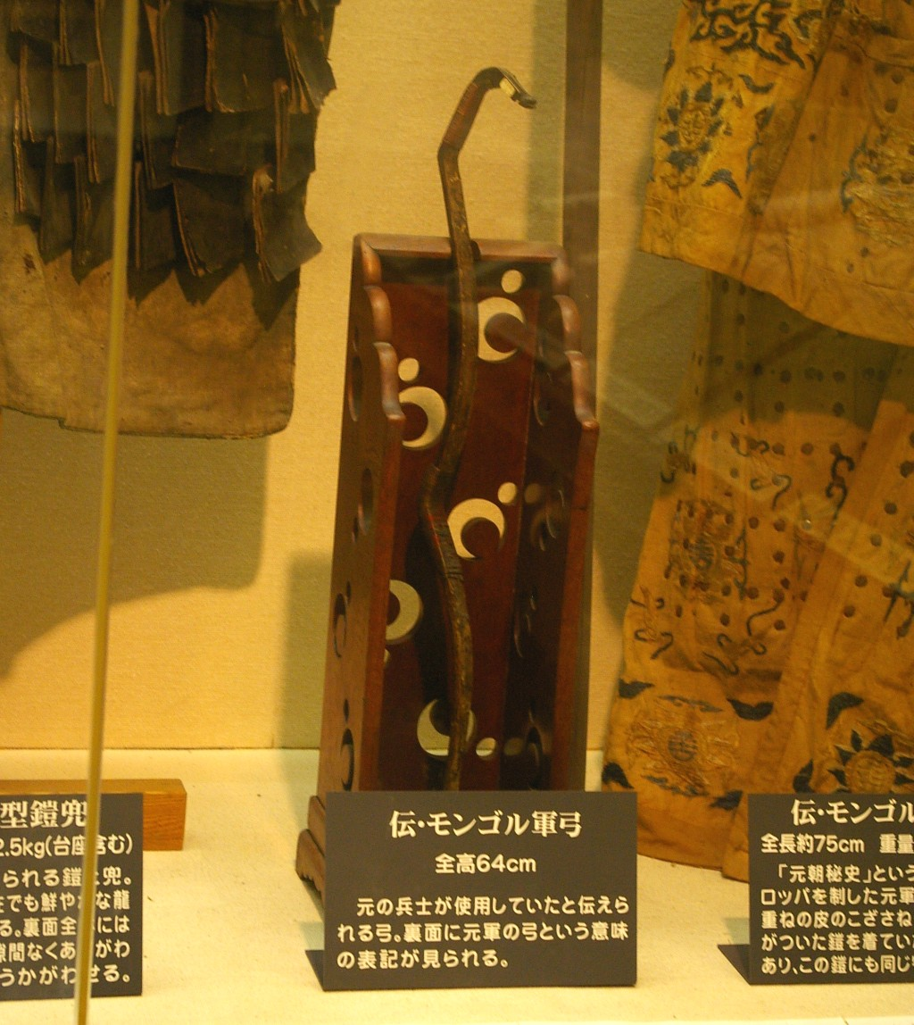 2008年福岡市博多区東公園｢元寇資料館｣にて